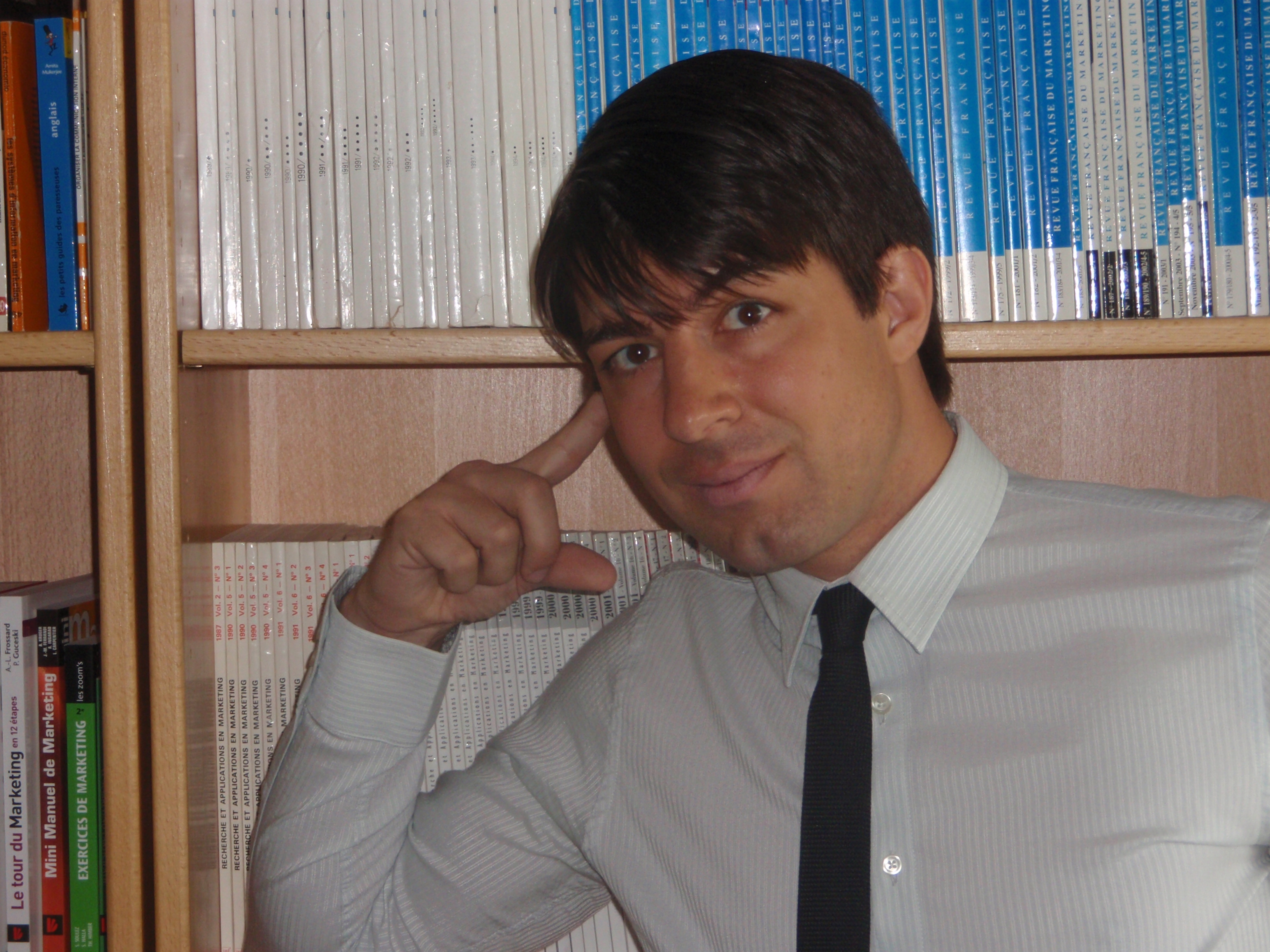 Andreas Kaplan